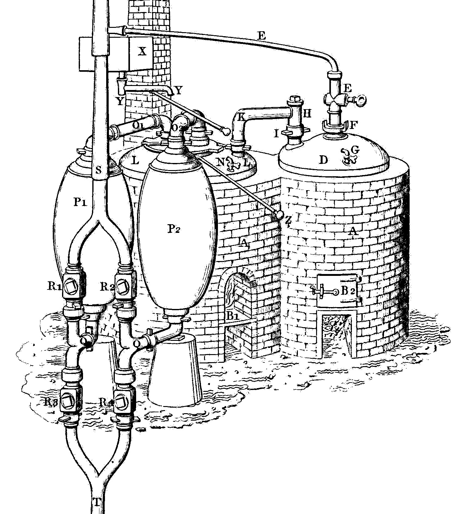 トマス・セイヴァリによる蒸気機関の外観図